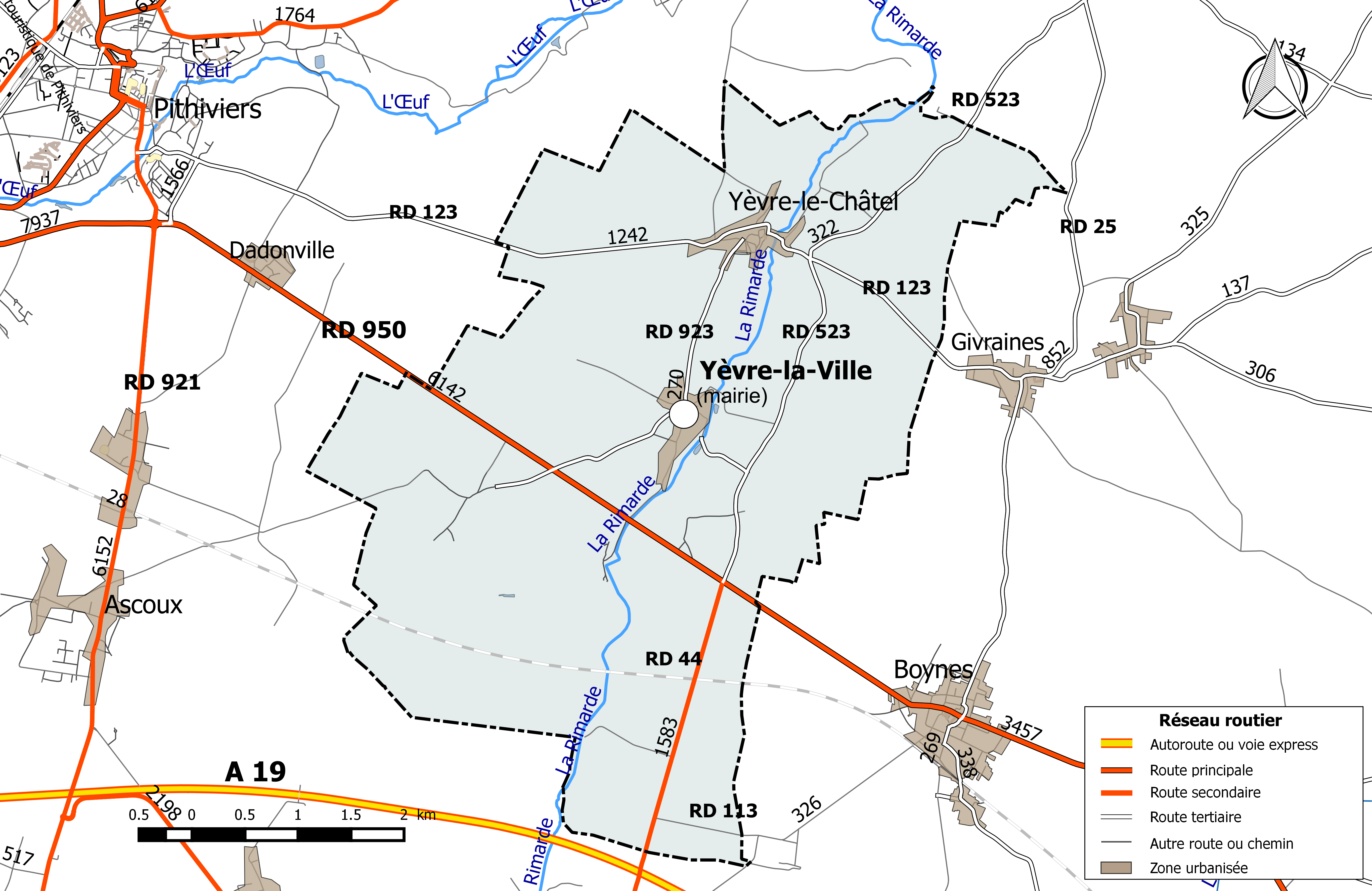 Carte du réseau routier de la commune de Yèvre-la-Ville.